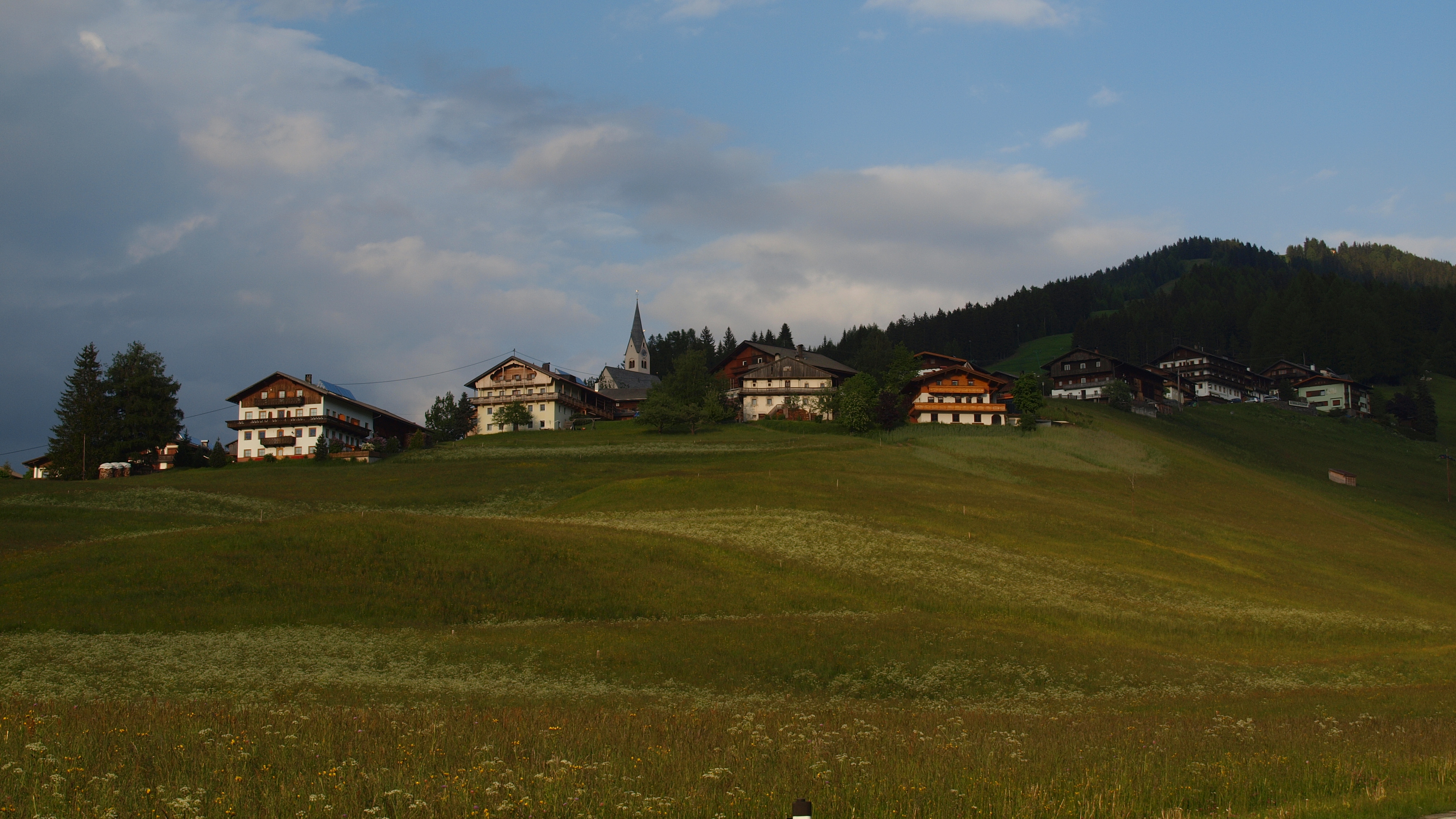 Sankt Oswald (Gemeinde Kartitsch), Österreich